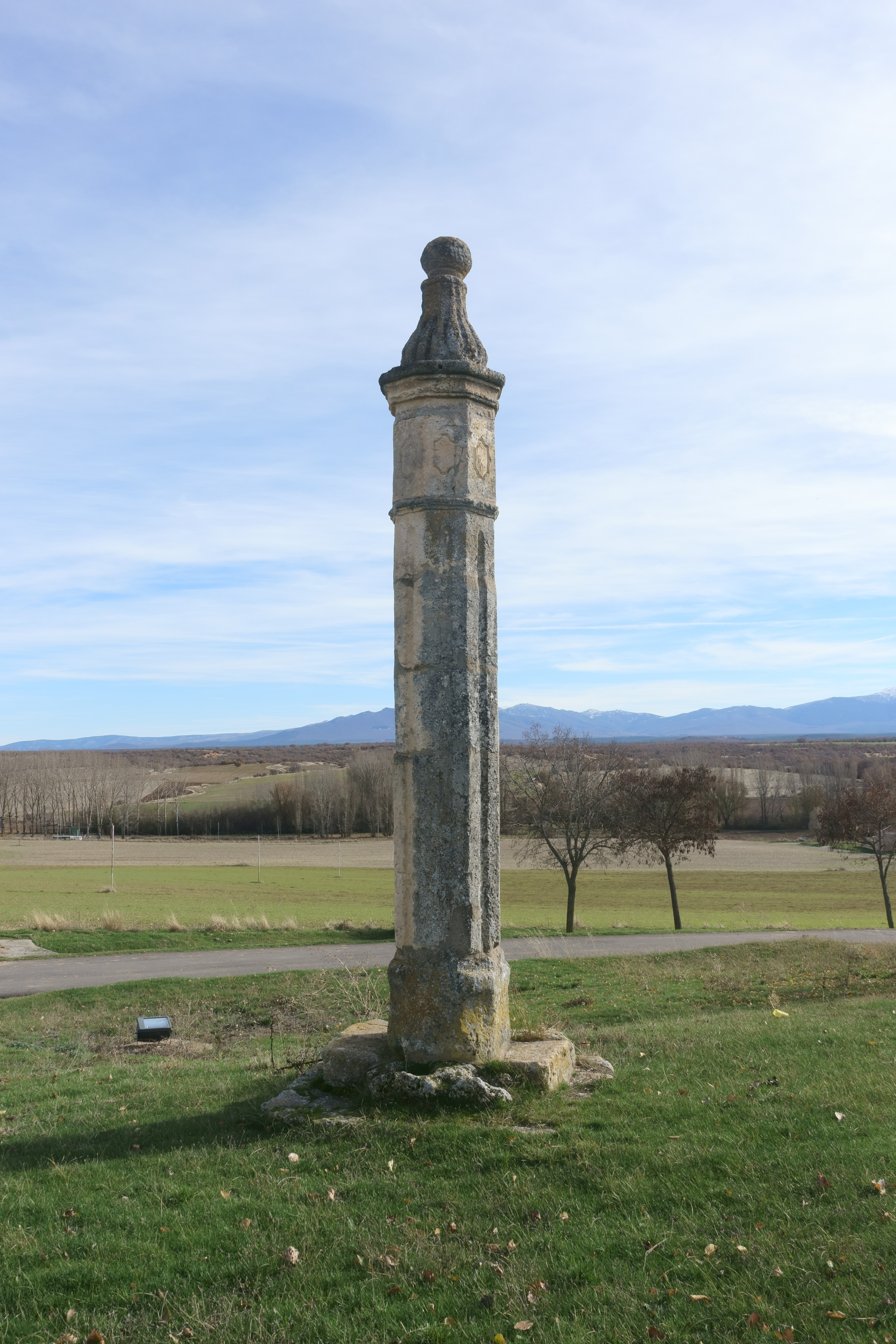 Picota o rollo jurisdiccional de Grajera (Segovia, España).